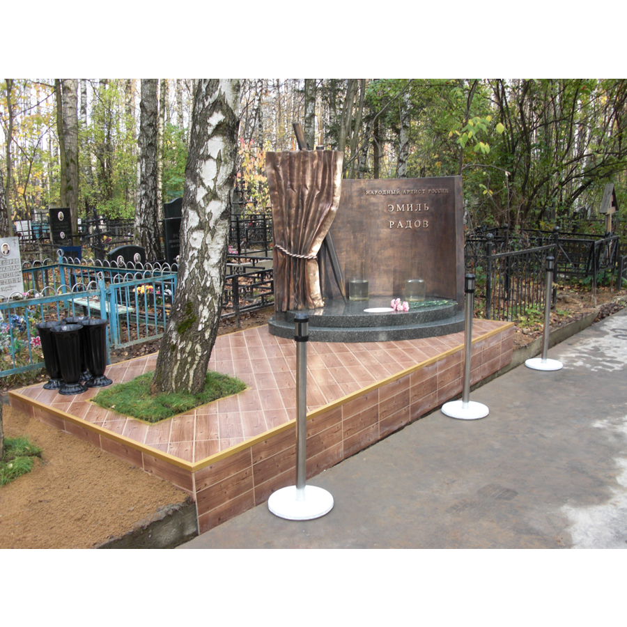 Надгробие